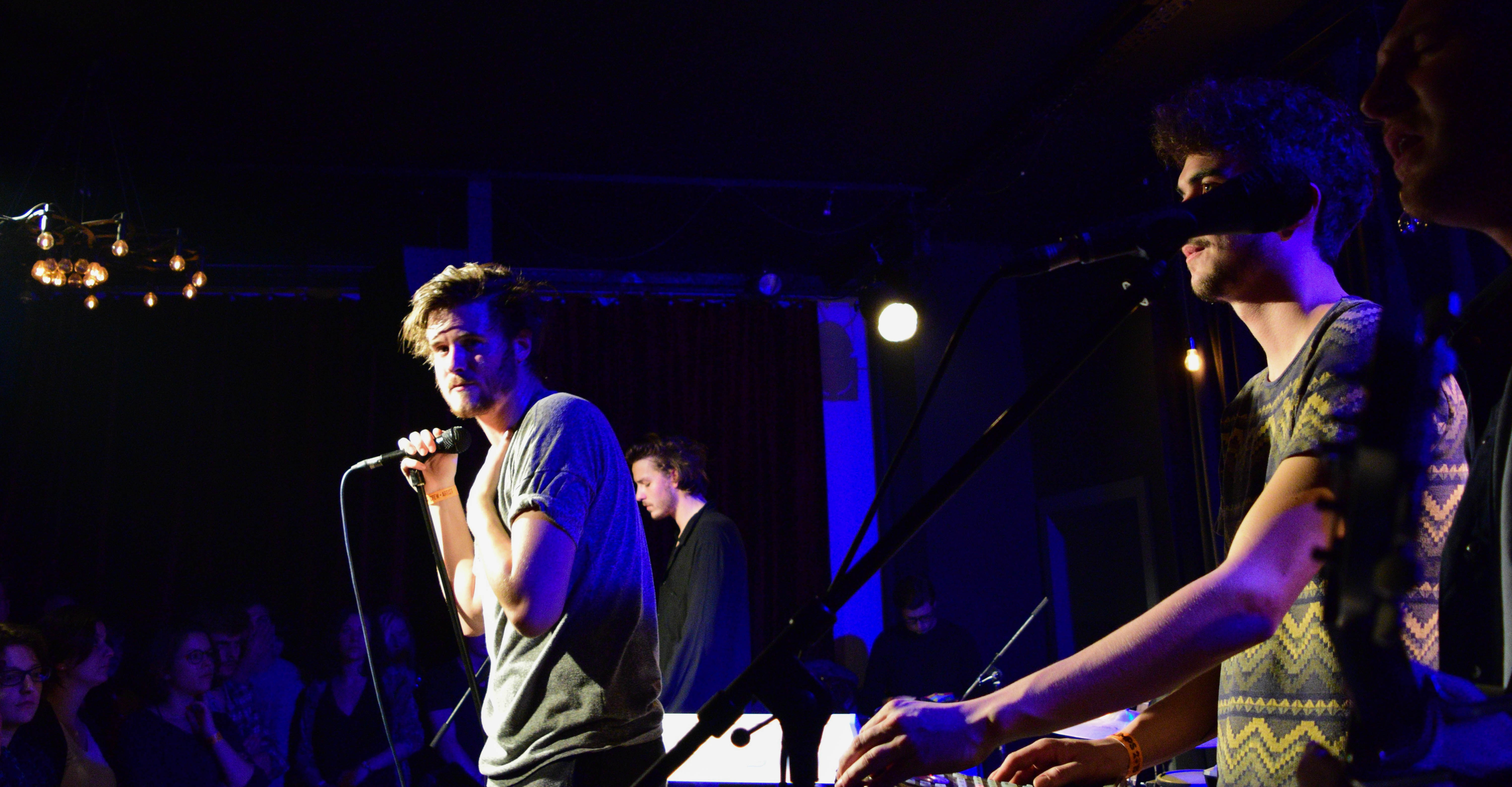 Bazart tijdens een optreden op 11 december 2015